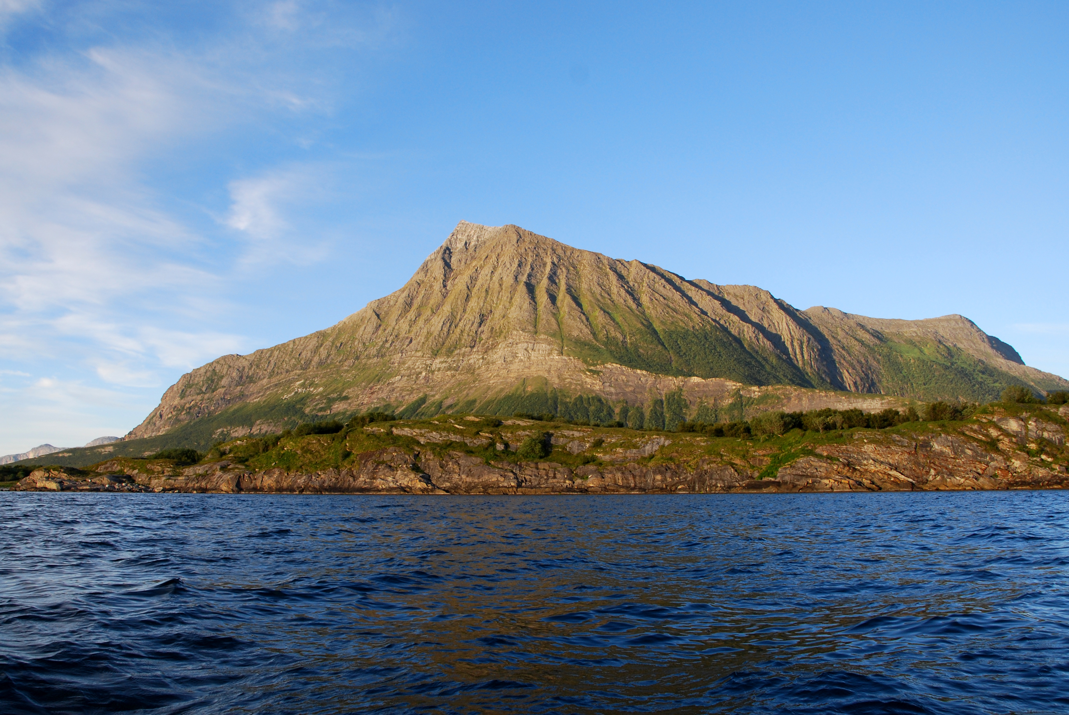 Sandhornet.